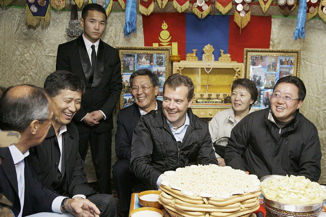 Дмитрий Медведев и Президент Монголии Цахиагийн Элбэгдорж посетили место проведения совместных военных учений «Дархан-2» под Улан-Батором.